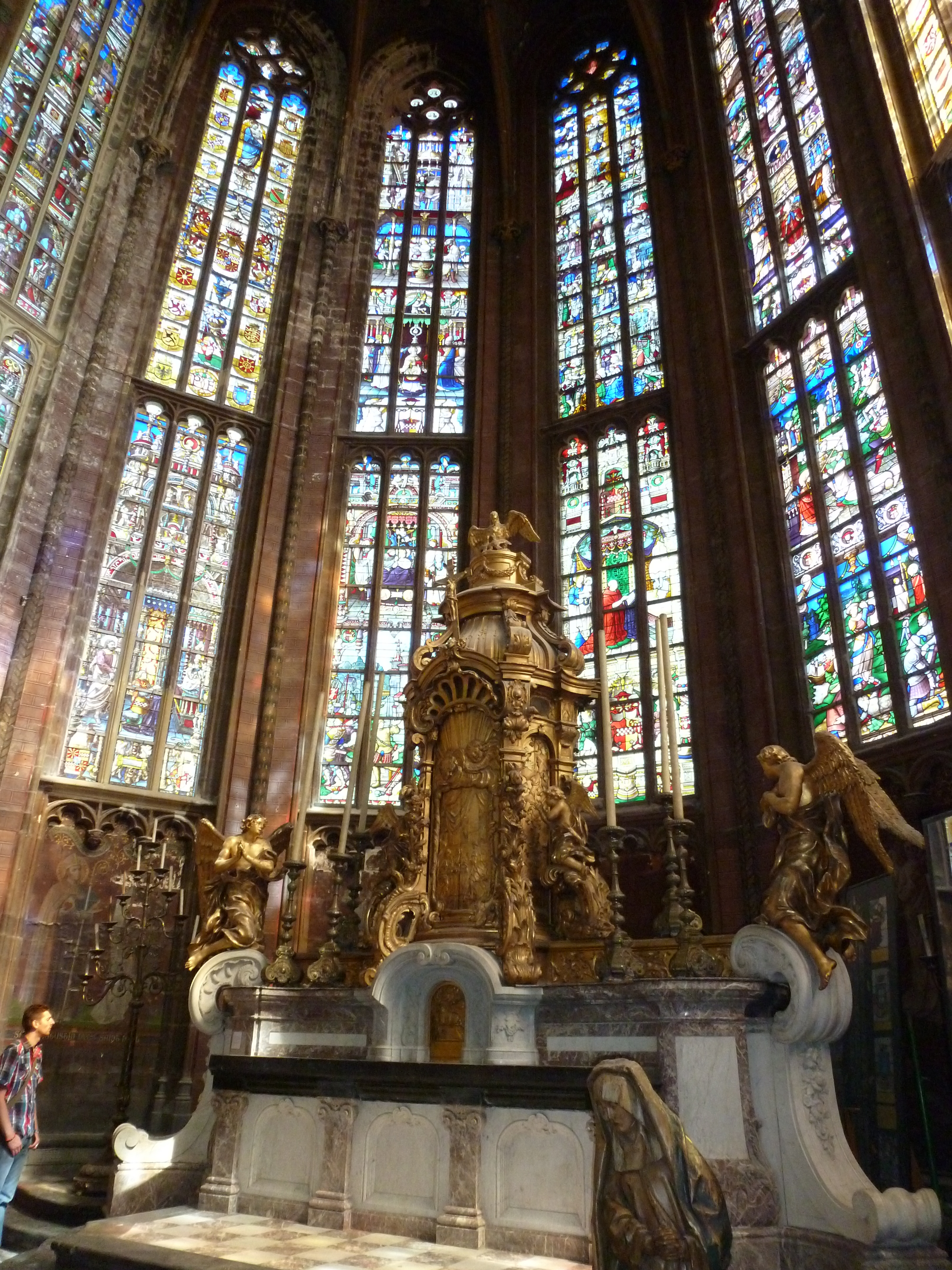 collégiale Saint-Martin - vue intérieure - autel et vitraux du choeur